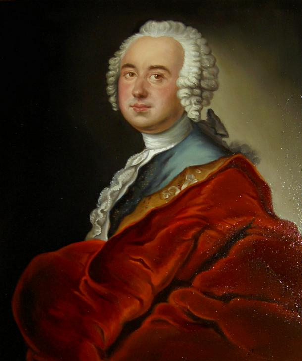 Ölgemälde des Freiherren J. F. von Bielfeld geb. 31.03.1717 - gest. 05.04.1770